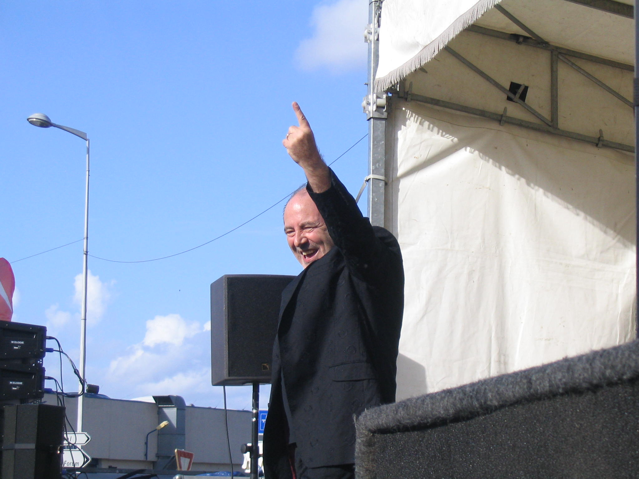 Michel Delpech en concert le 1er octobre 2006 à Louviers, à l'occasion de la fête Saint Michel organisée par la ville. Photographie personnelle.